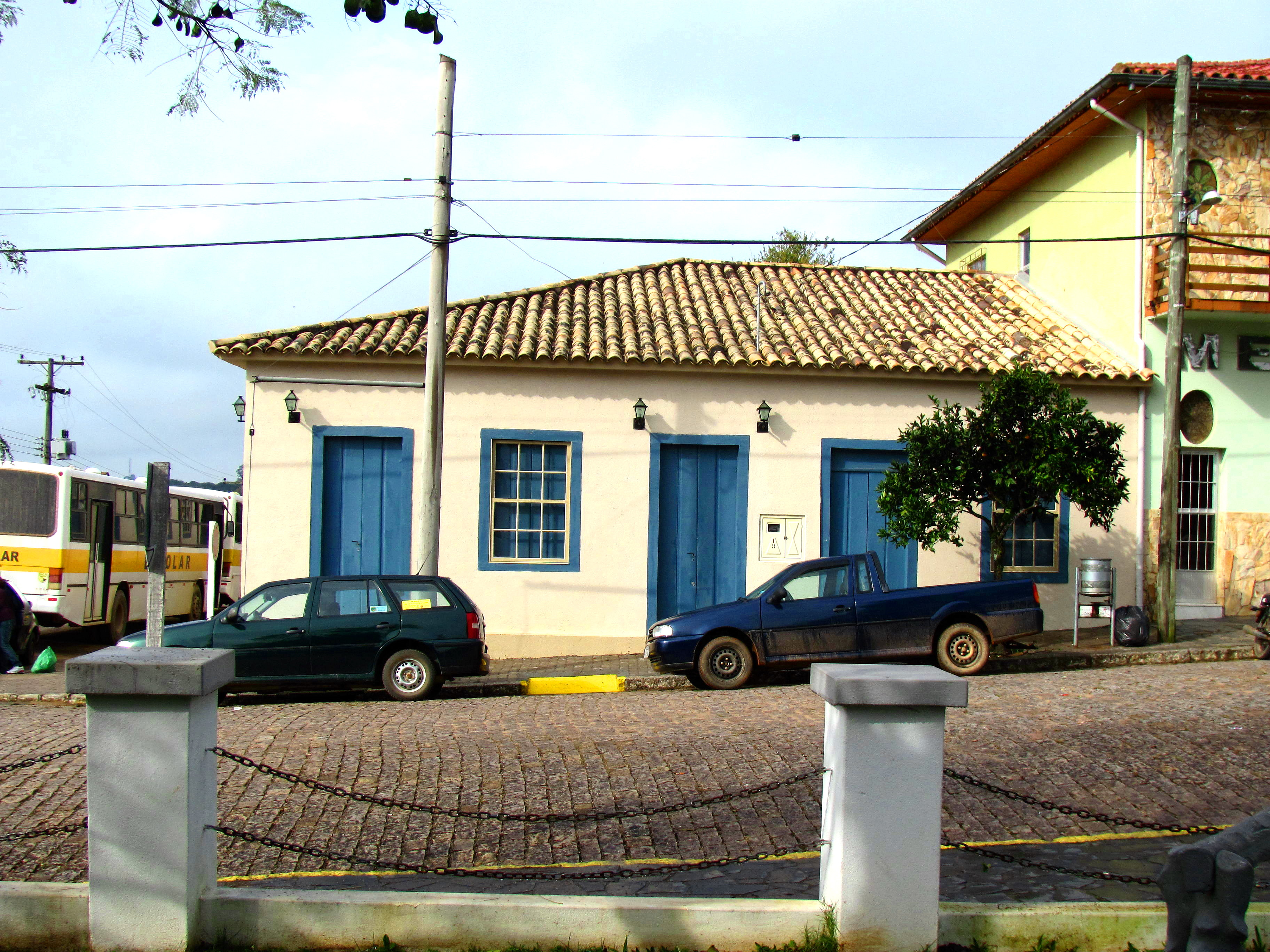 Casa em Sentinela do Sul